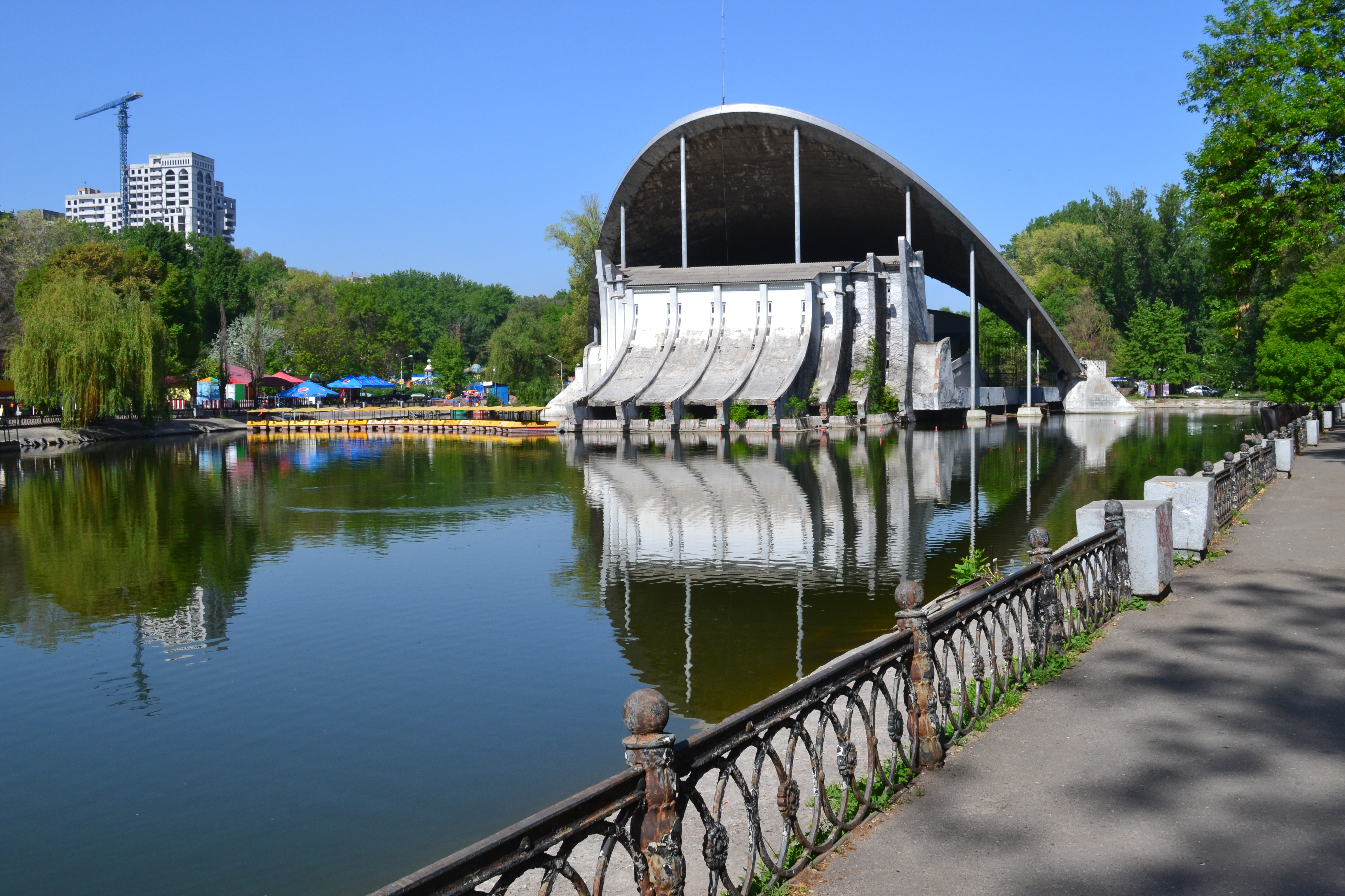 Парк ім. Чкалова, м. Дніпропетровськ, Пр. Карла Маркса,96